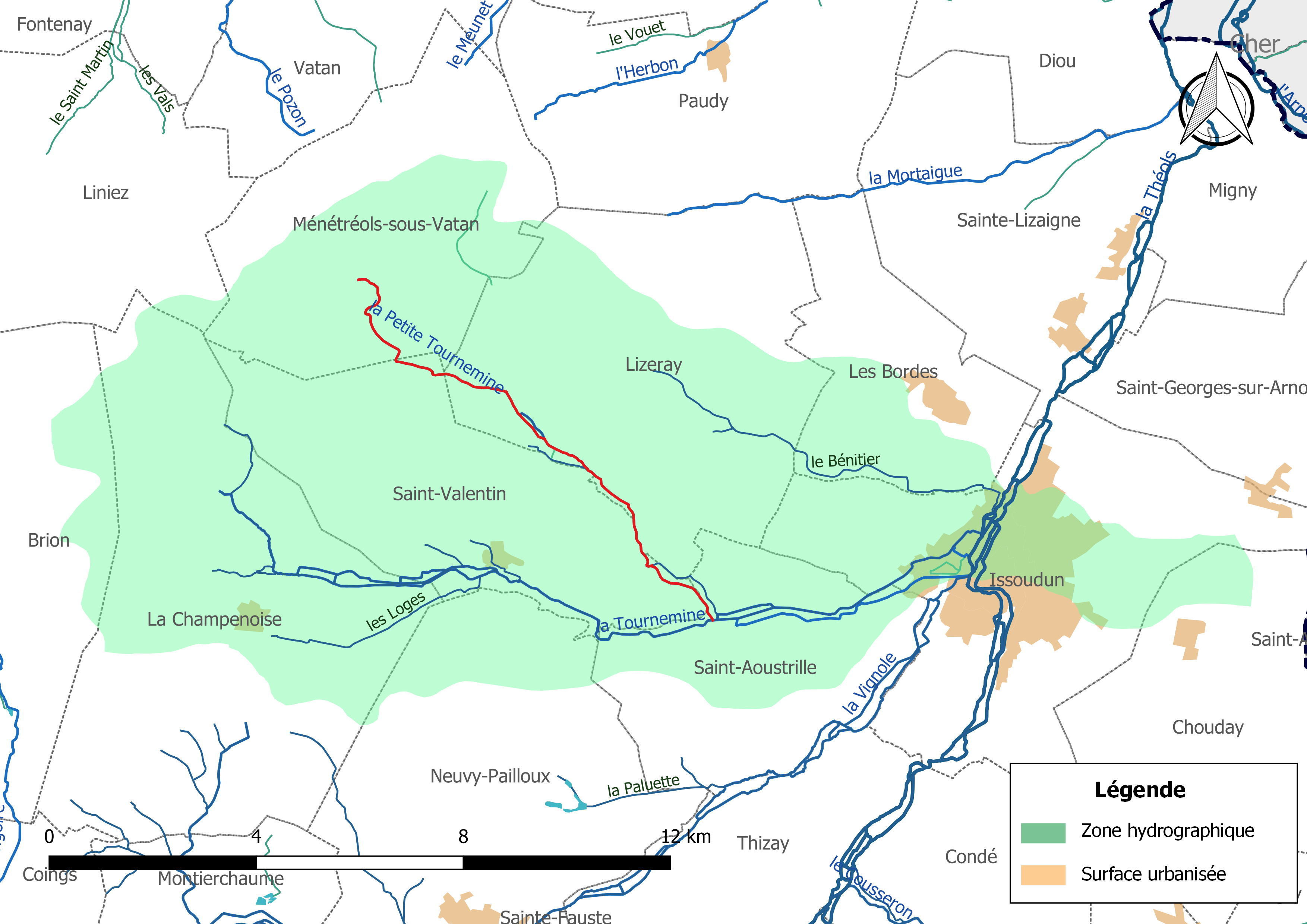 Carte du cours d'eau « la Petite Tournemine » (France) et de la zone hydrographique dans laquelle il s'insère.